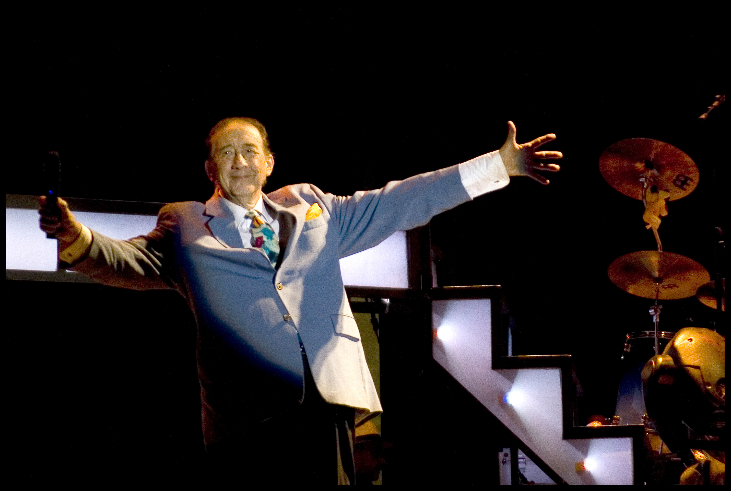 Luis Aguilé, 2007-07-29.